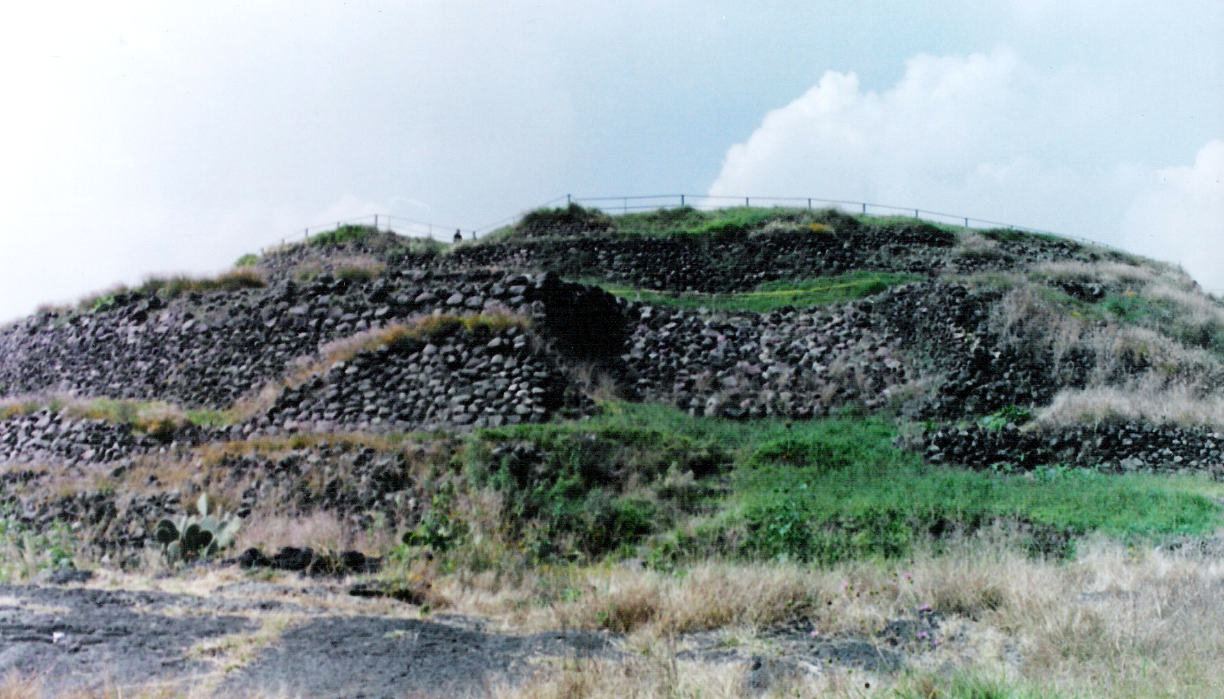 foto de la piramide de cuicuilco tomada desde la parte trasera